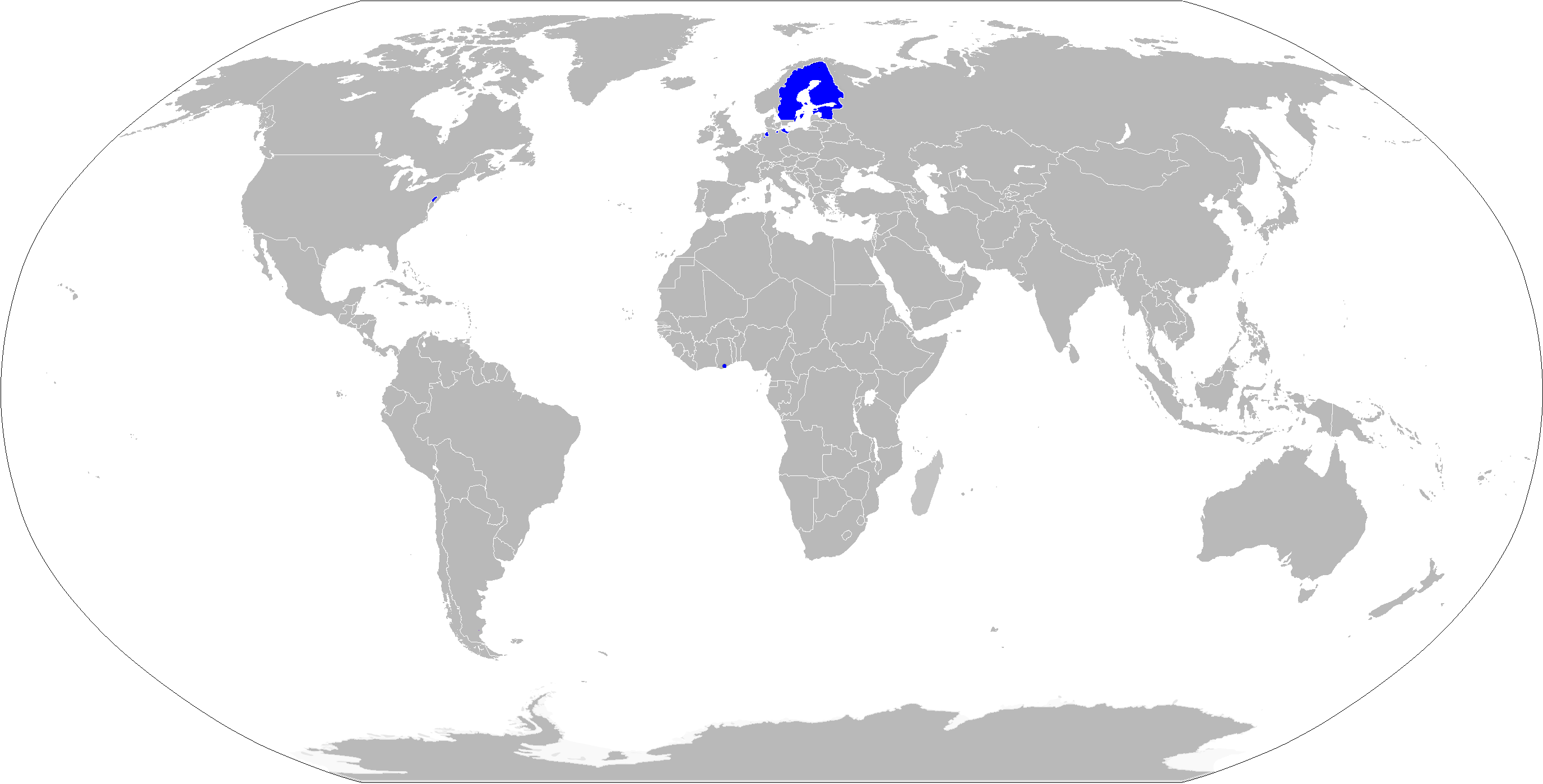 Sverige och dess kolonier runt år 1650